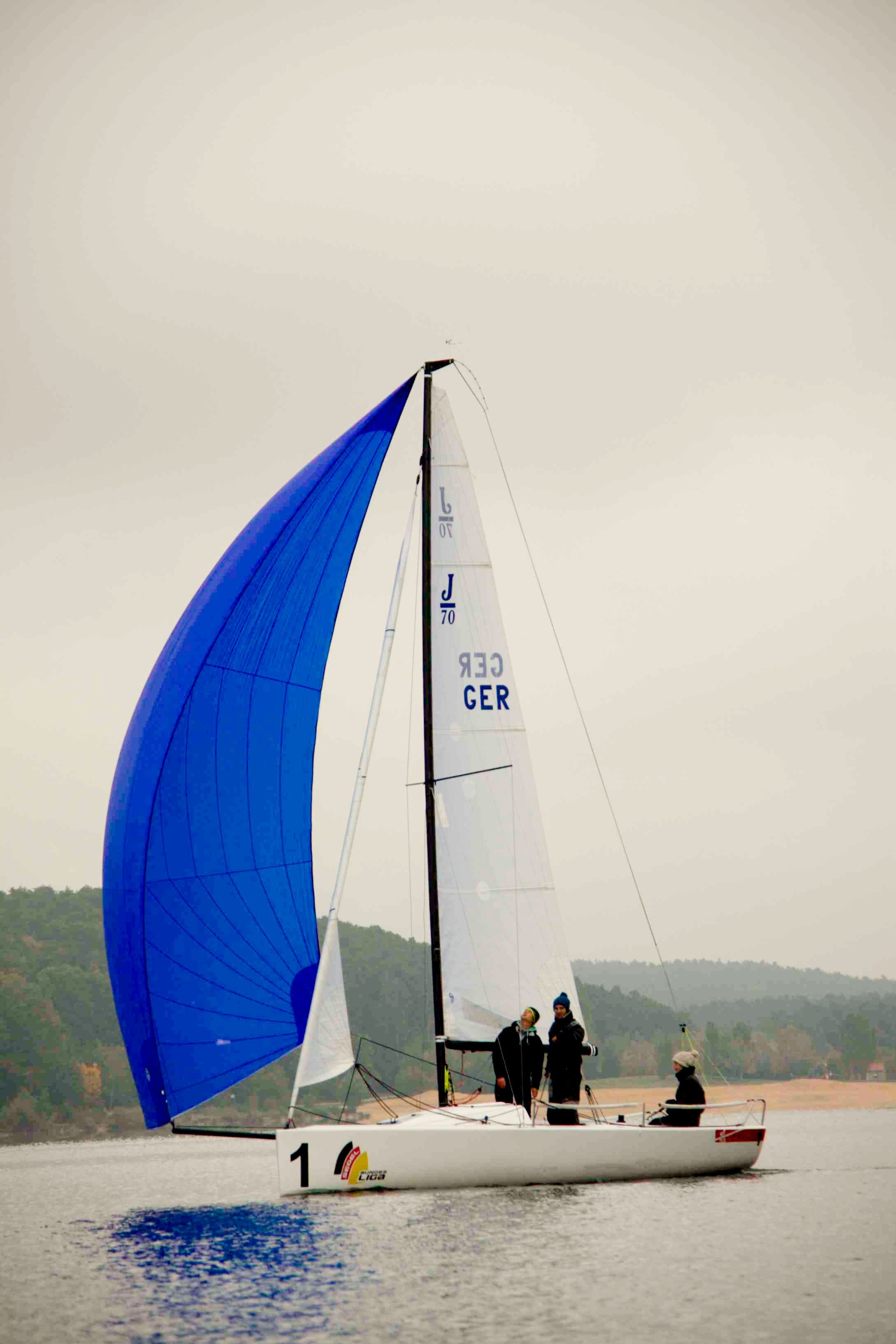 Keelboat J70